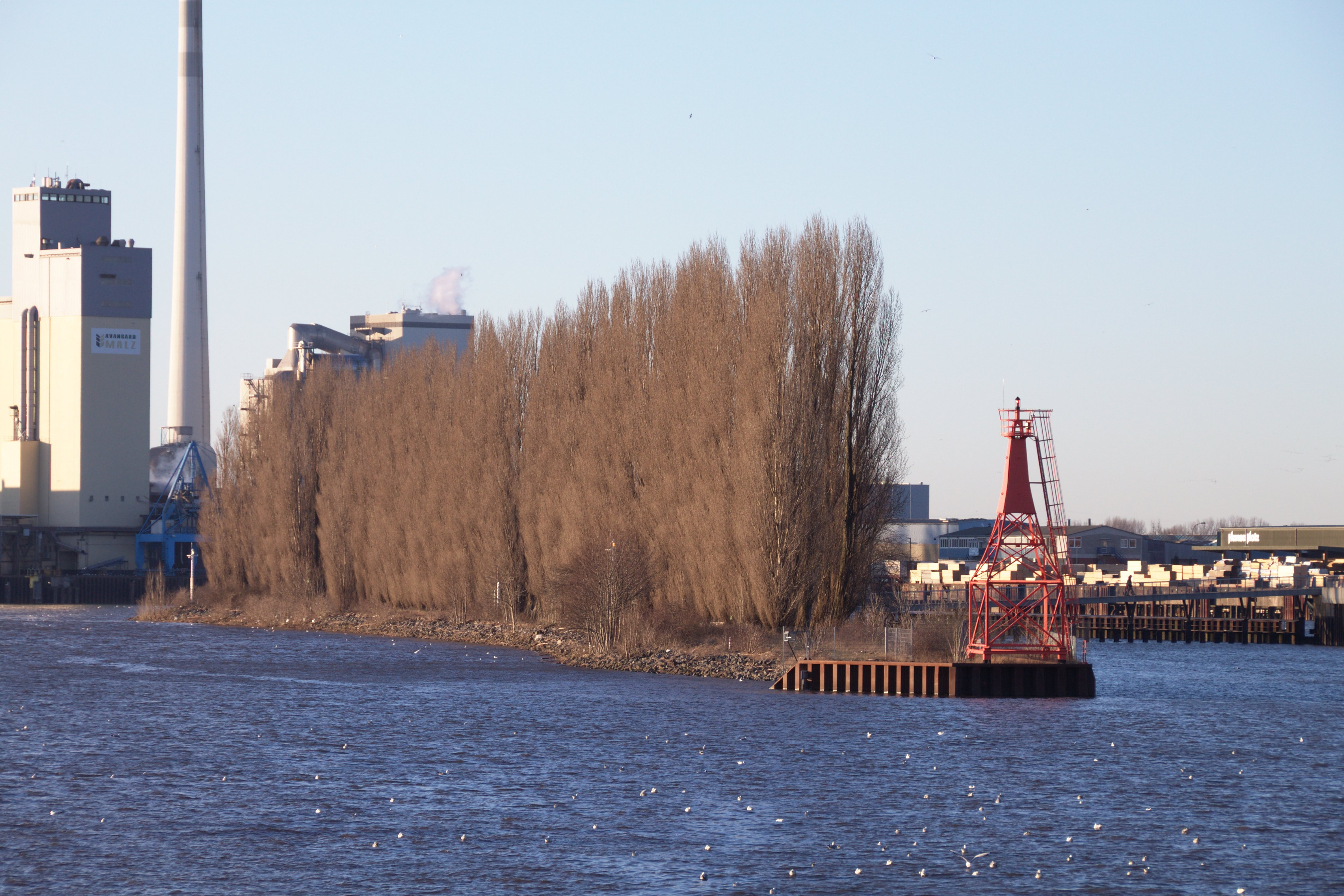 Gitterbake Shipyard Island (Bremen)